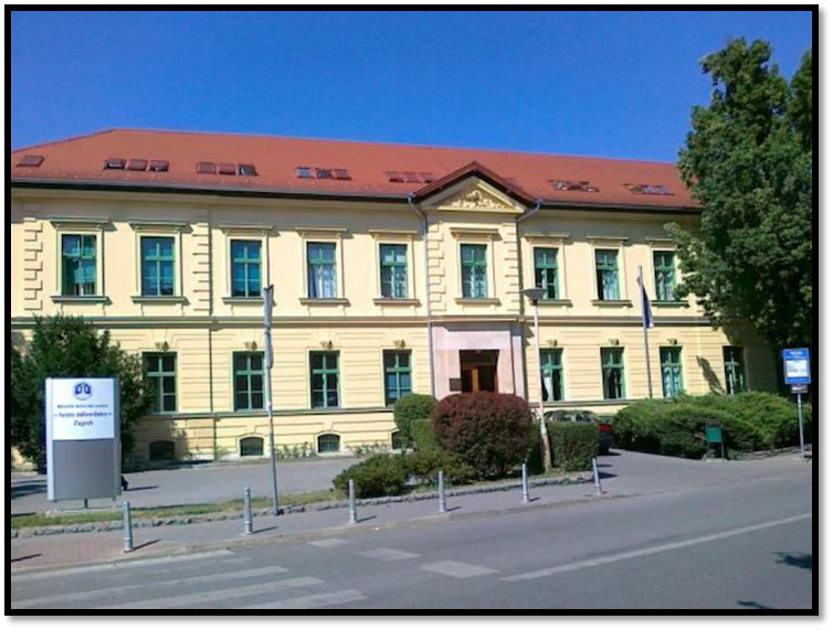 Клиническая больница Сестер милосердия, Загреб